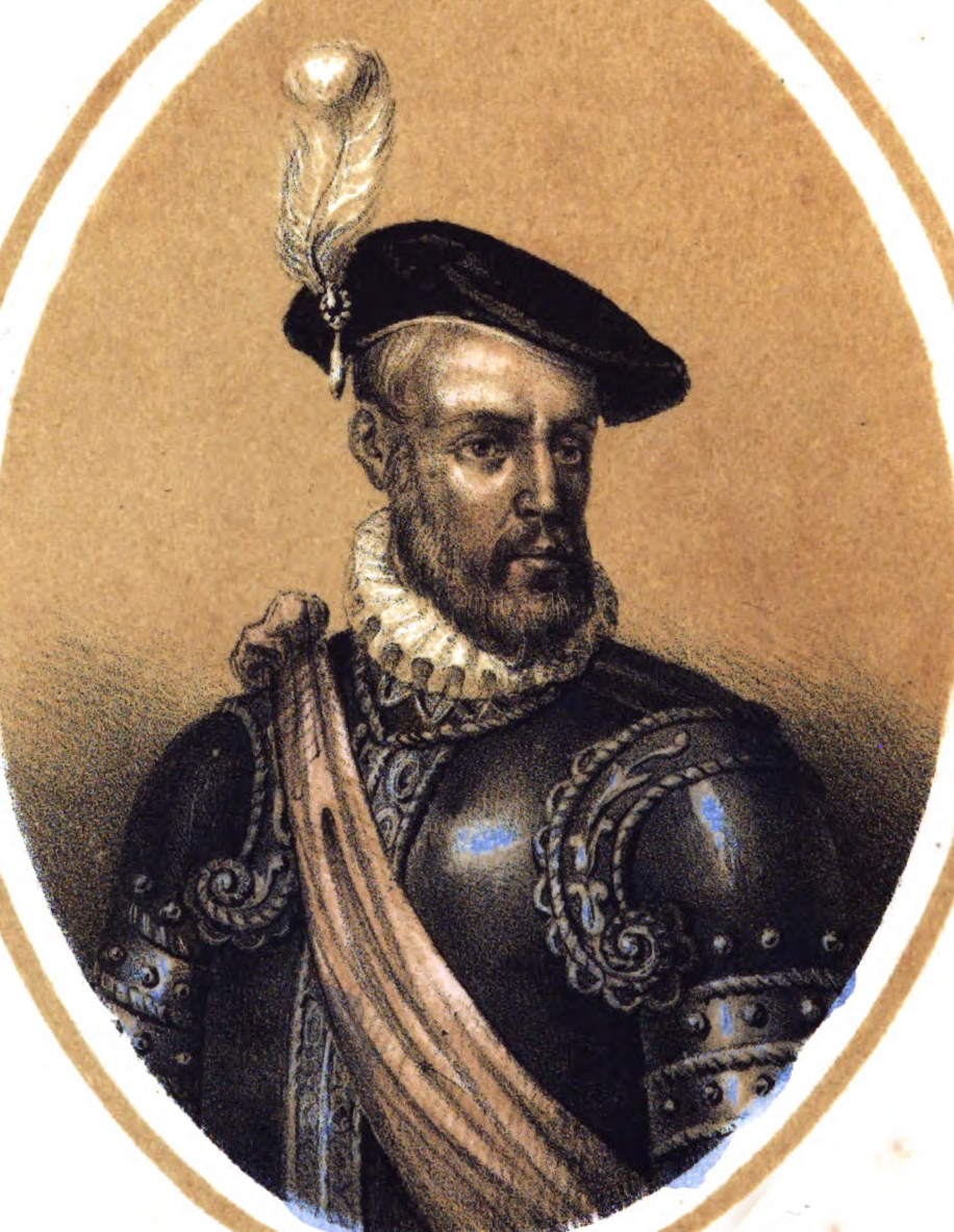 Juan de Padilla.